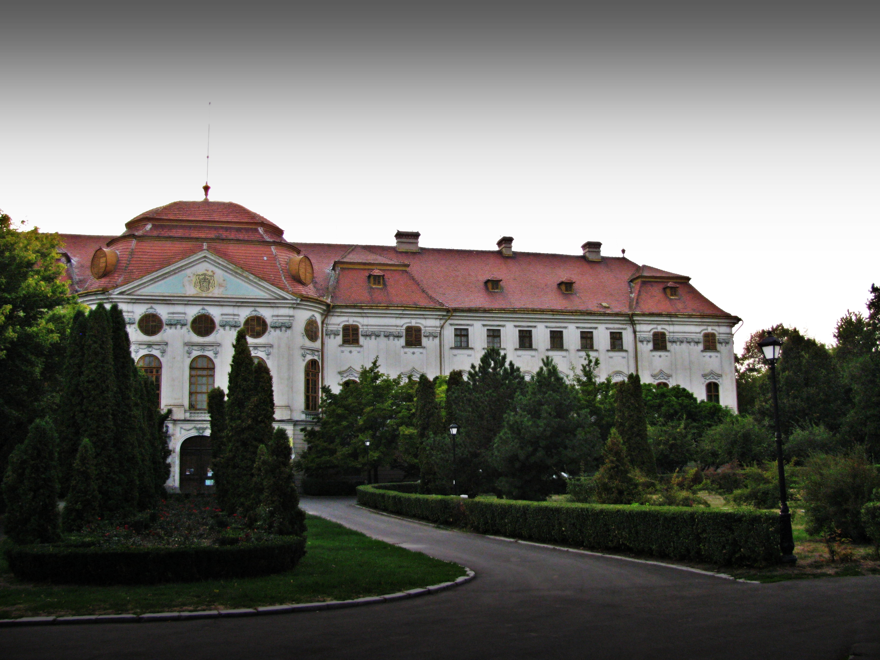 Palatul Episcopal Romano-Catolic